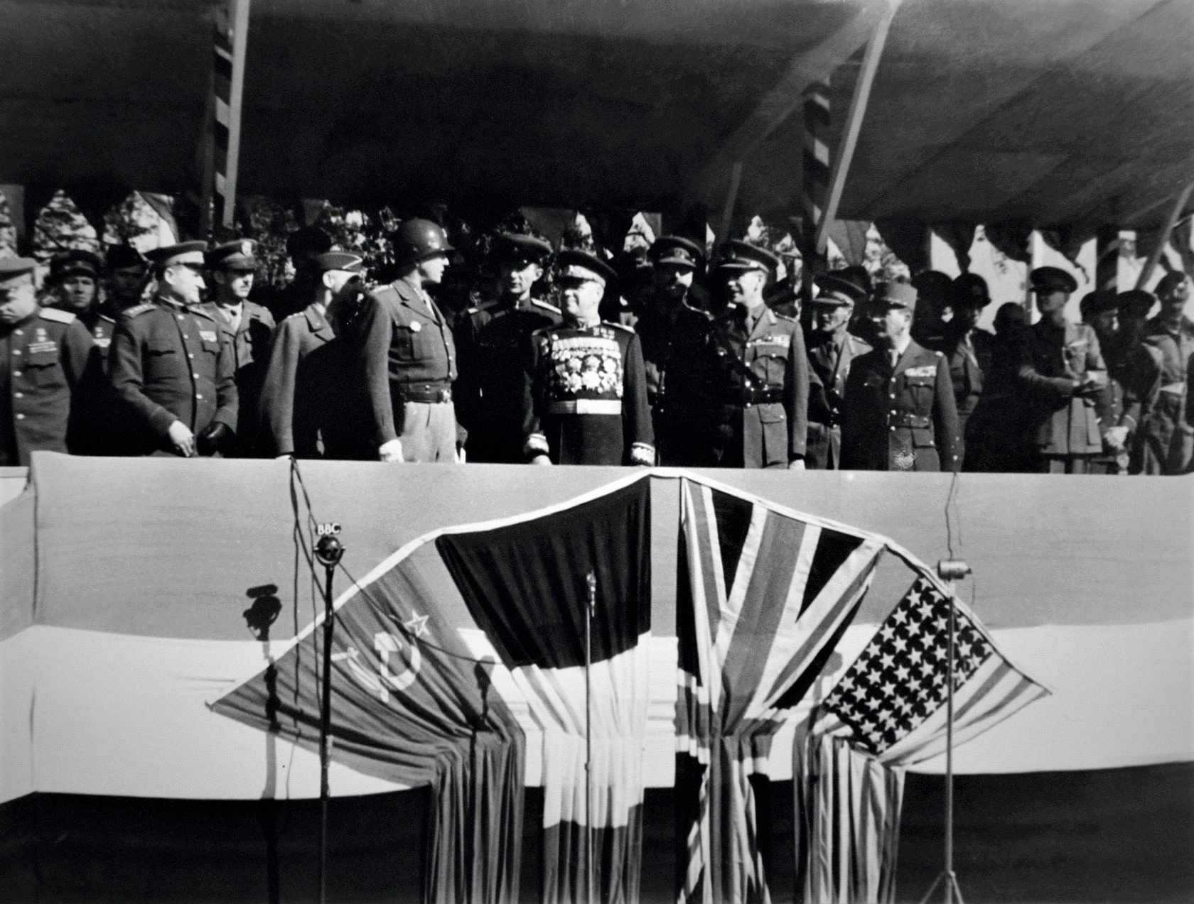 Берлинский парад Победы. На трибуне в центре в первом ряду стоят слева направо: представитель армии США генерал Джордж Паттон, командующий Группой советских оккупационных войск в Германии Маршал Советского Союза Г. К. Жуков, заместитель командующего британскими оккупационными войсками генерал-майор Брайан Робертсон и командующий французскими оккупационными войсками в Германии и на Рейне генерал Мари-Пьер Кёниг